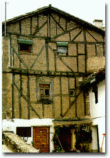 casa de juderia